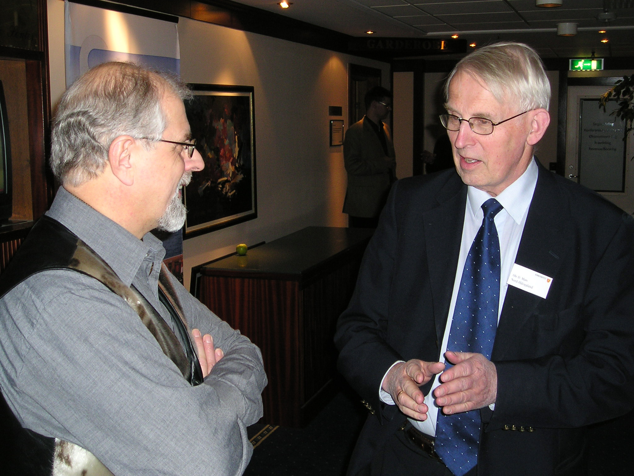 Biskop Per Oskar Kjølaas (t.v.) og professor Ole Danbolt Mjøs (t.h.) under Kirkemøtet 2004